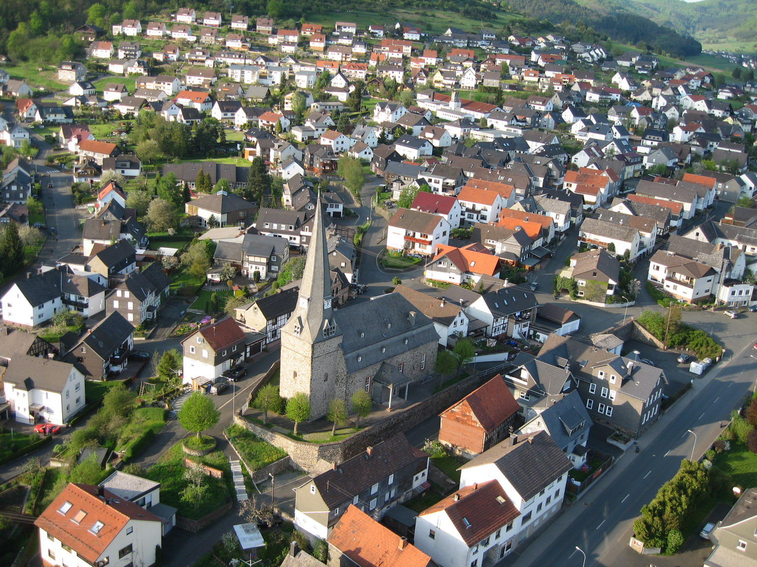 evangelische Kirche Wallau/Lahn